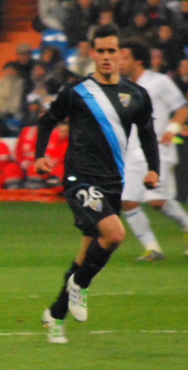 Carvalho